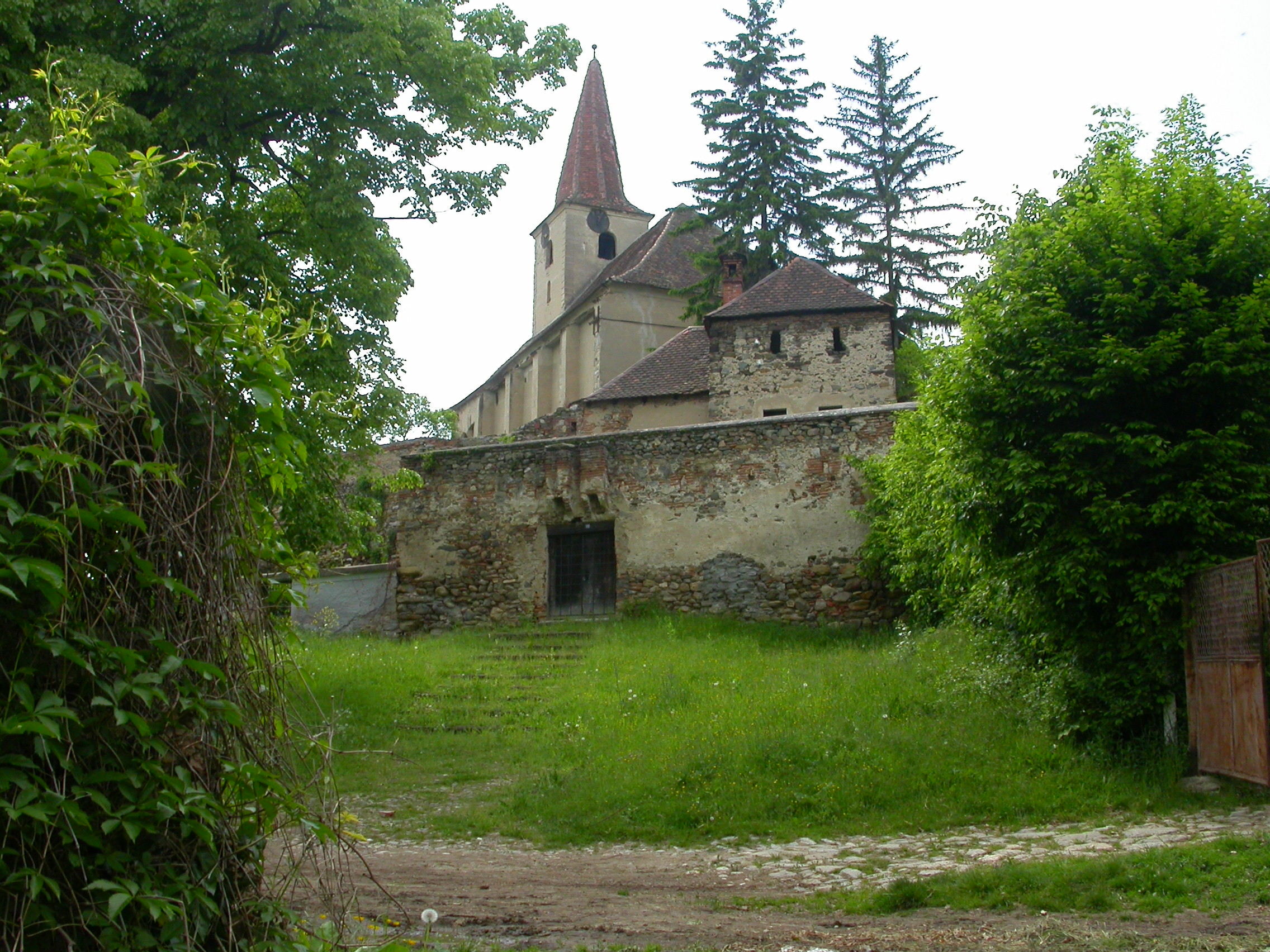 Ansamblul bisericii evanghelice fortificate, sec. XIII-XIX